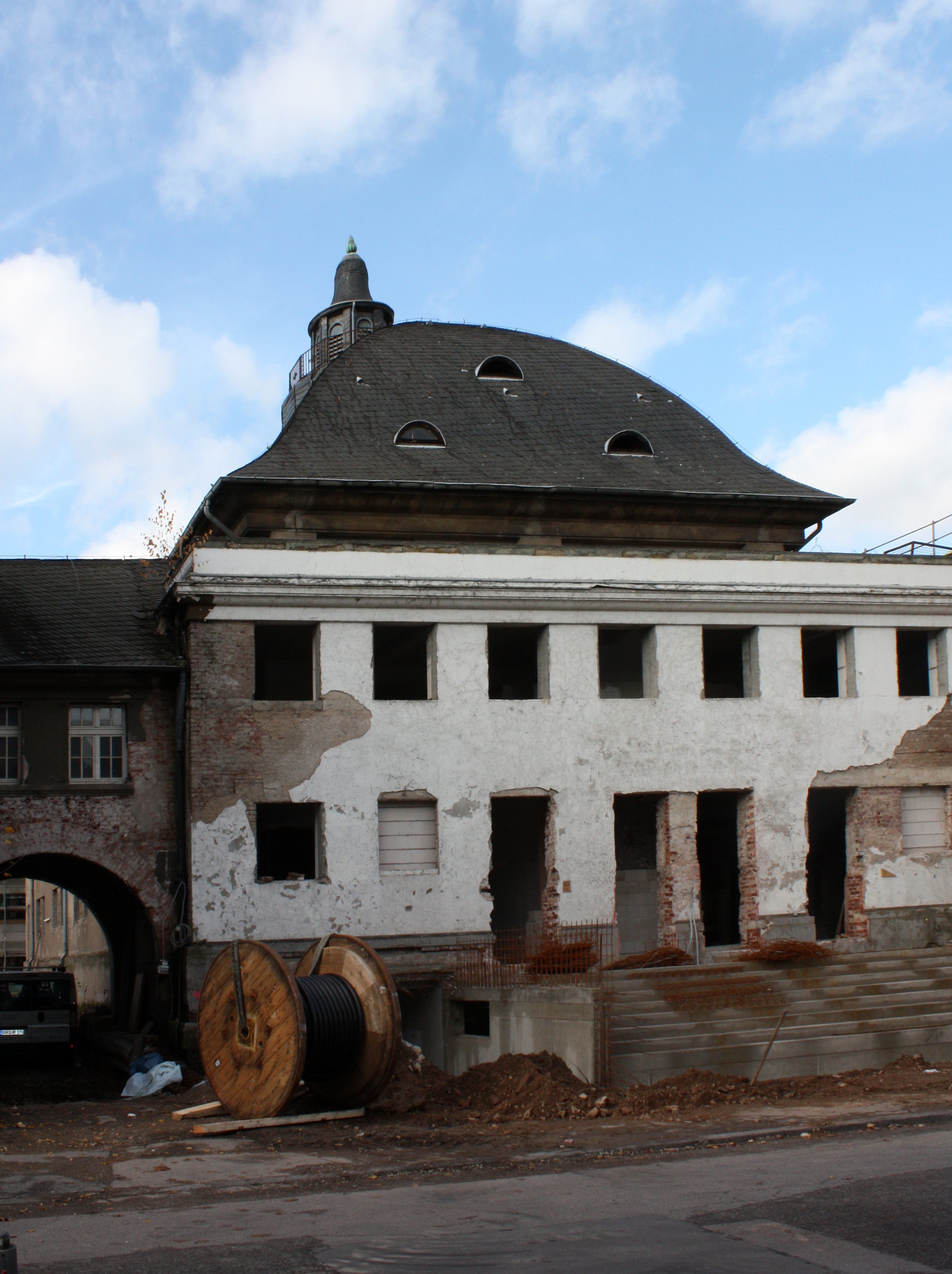 Köln, ehemaliges Deutz-Kalker Bad